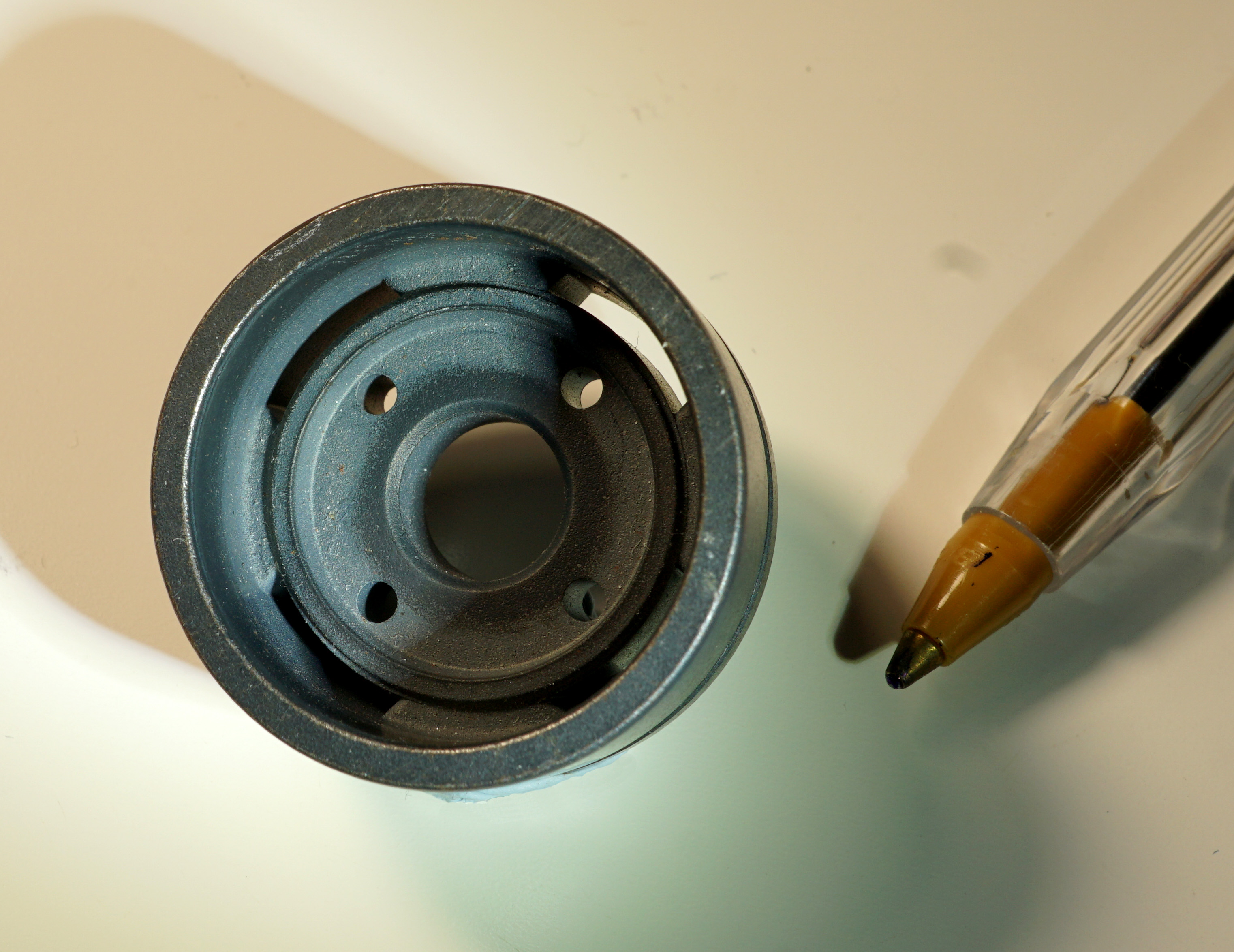 Pieza sinterizada.